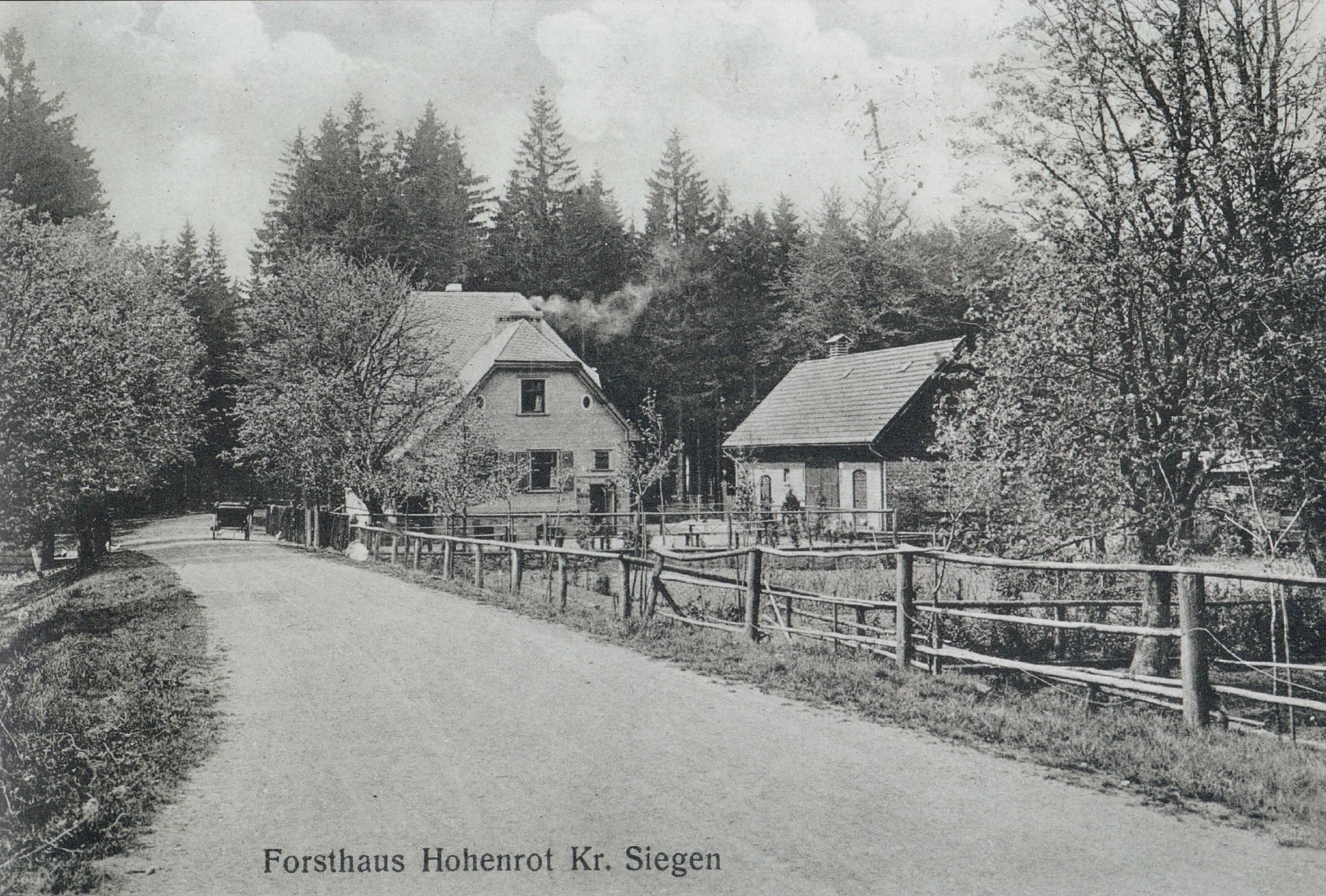 Postkarte Forsthaus Hohenroth, Krs. Siegen. Aufnahme um 1910 (Neubau des Forsthauses). Ansicht aus Richtung Eisenstraße. Die Postkarte befindet sich im Besitz von Dieter Bald und wurde von ihm digitalisiert. Das Werk ist gemeinfrei, weil seine urheberrechtliche Schutzfrist abgelaufen ist.